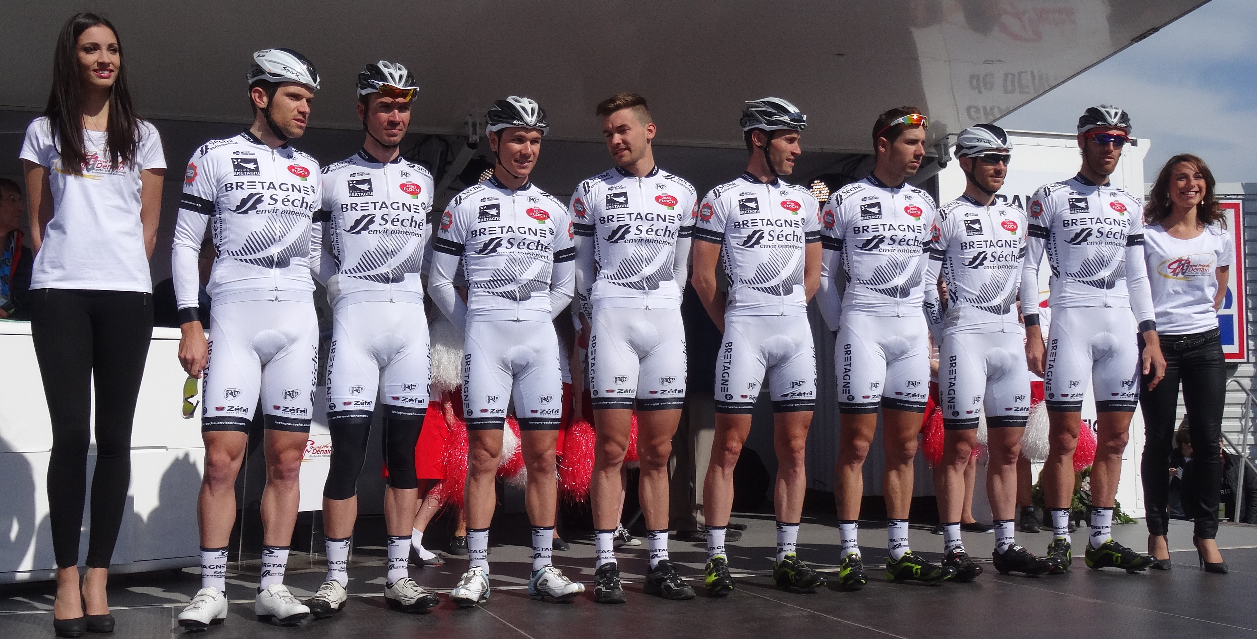 Reportage réalisé le jeudi 17 avril à l'occasion du départ et de l'arrivée du Grand Prix de Denain 2014 à Denain, Nord, Nord-Pas-de-Calais, France.